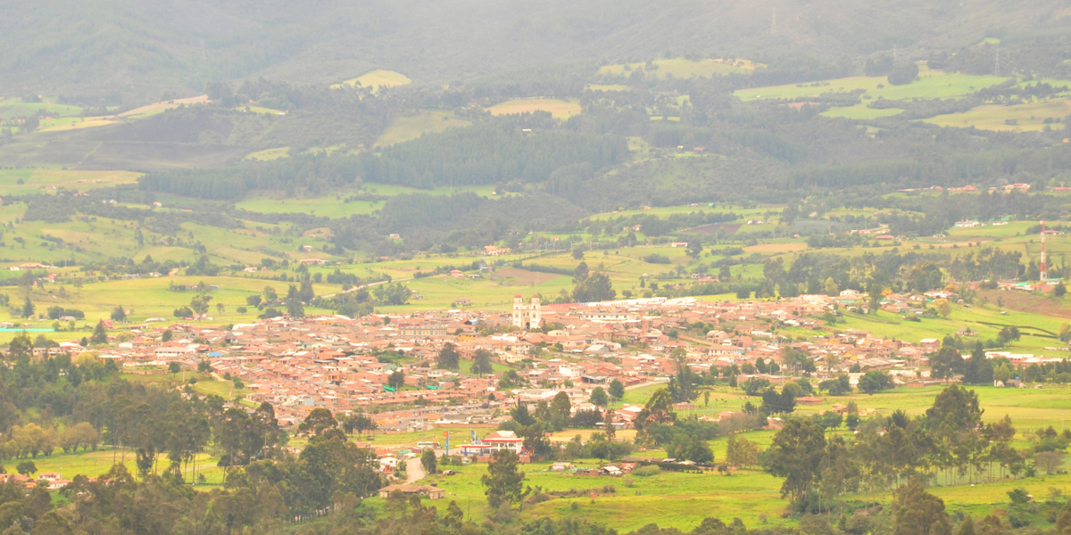 Guasca vista desde el occidente